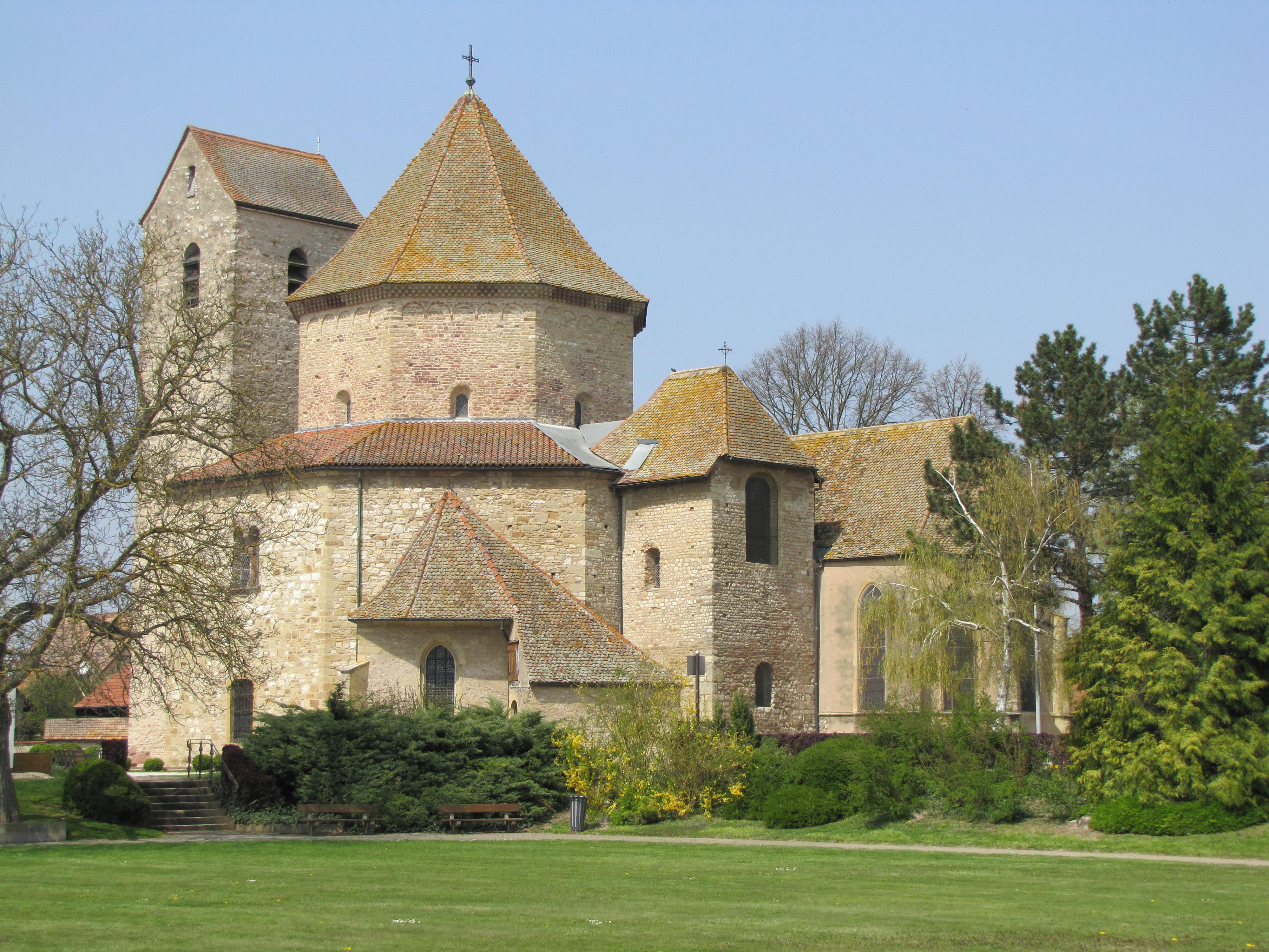 Alsace, Haut-Rhin, Ottmarsheim, Église abbatiale d'Ottmarsheim (PA00085580, IA00096033).